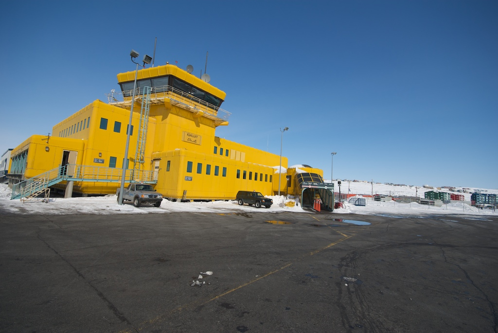 Iqaluit airport